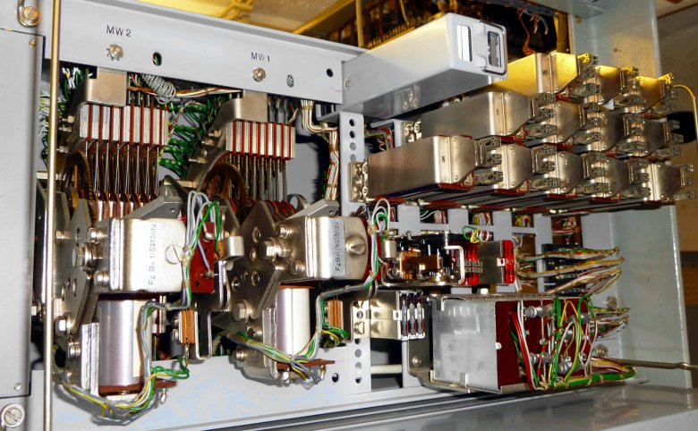 Für das Wählprüfnetz war in jeder Vermittlungsstelle ein Prüfgruppenwähler (Prüf-GW) vorhanden. In jedem Leitungswählergestell gab es einen Prüfleitungswähler (Prüf-LW) Das Bild zeigt den PrGW 55 für kleine Ortsnetze, damit konnten EMD- und HDW-Vermittlungsstellen überprüft werden.